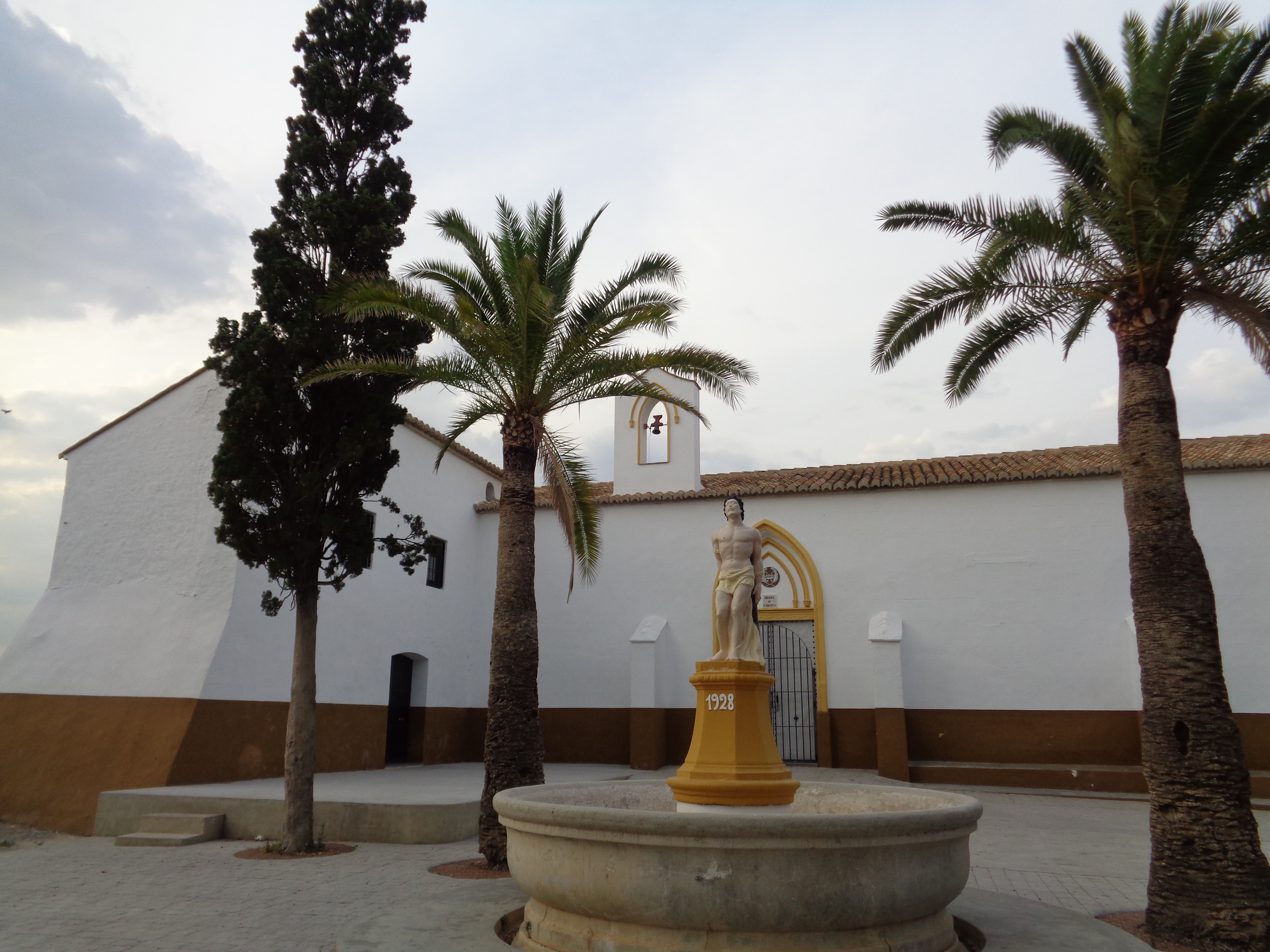 La Pobla de Vallbona.